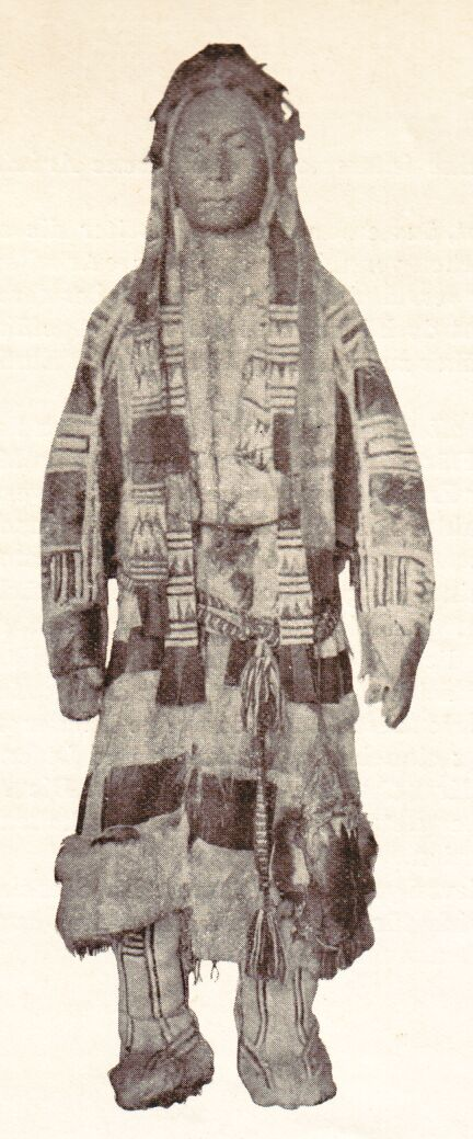 A Samojed in his Winterdress Samojede im Winterkostüm. - Das mantelartige Oberkleid ist aus Renntier mit Fuchs gefüttert. Der Ueberzug ist mit Einsätzen einer Mosaikarbeit aus weissen und grauen Renntierklauen und bunten Lederriemen, geschmückt. Die Stiefeln sind aus Seehund. Samoyede, en costume d'hiver. Le vêtement du dessus est fait en peaux de rennes, fourré de renard. Sur le dessus se trouvent intercalées des bandes représentant un travail mosaique fait avec des pattes de renne blanc et marron rehaussé de laniéres de cuir coloré. A Samojed in his winterdress. This mantlelike upper garnment is of reindeer and lined with fox. The cover is adorned with stripes representing a Mosaicwork of white and grey reindeer-legs and coloured thongs. Thee boots are seal.